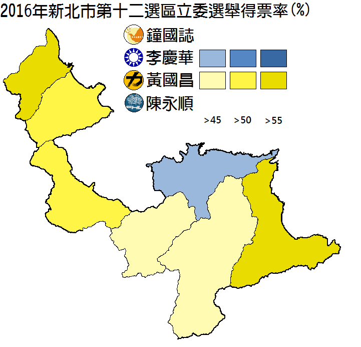 2016年新北市第十二選區立委選舉得票